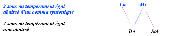 Temperament 2x12 pour 4 sons